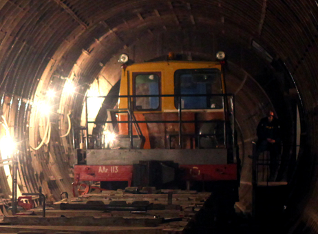 Автомотриса АЛг-113 в тоннеле Люблинско-Дмитровской линии Московского метрополитена